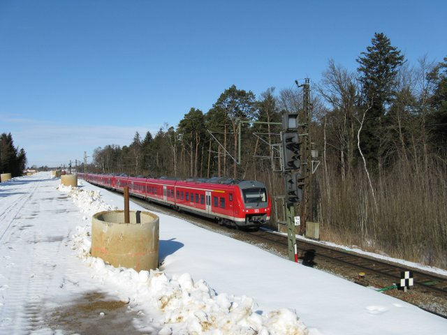 Ausbau KBS 980: Neuer Bahndamm aus Sand bei Haspelmoor